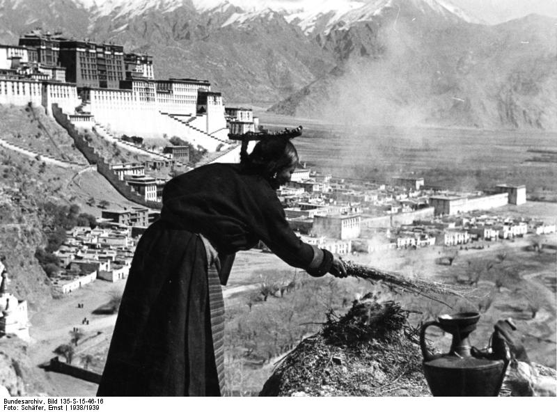 Lhasa, opfernde Tibeterin (auf dem Medizinberg) vor dem Potala